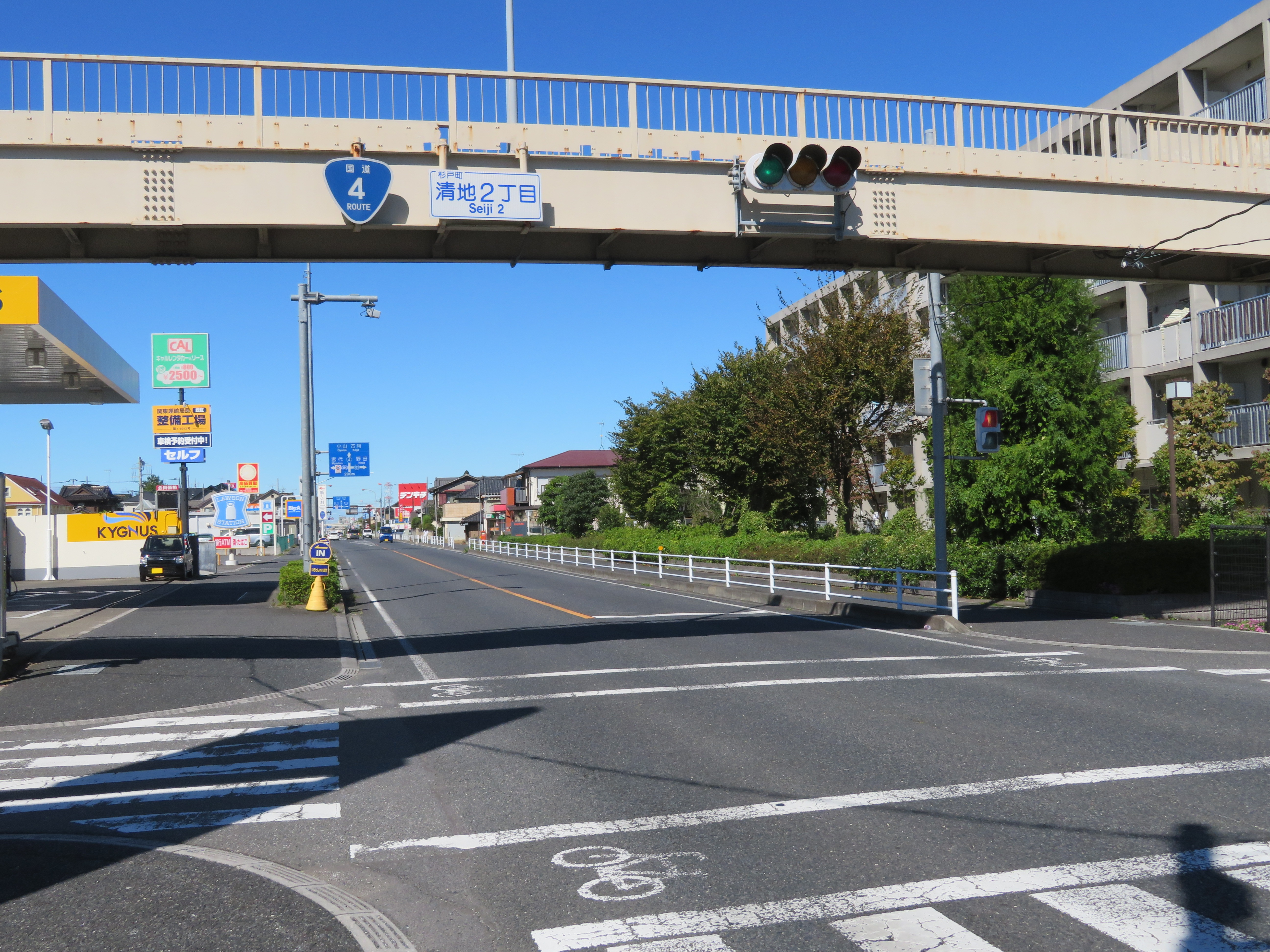 国道4号線埼玉県杉戸町清地2丁目付近（幸手方面を撮影）